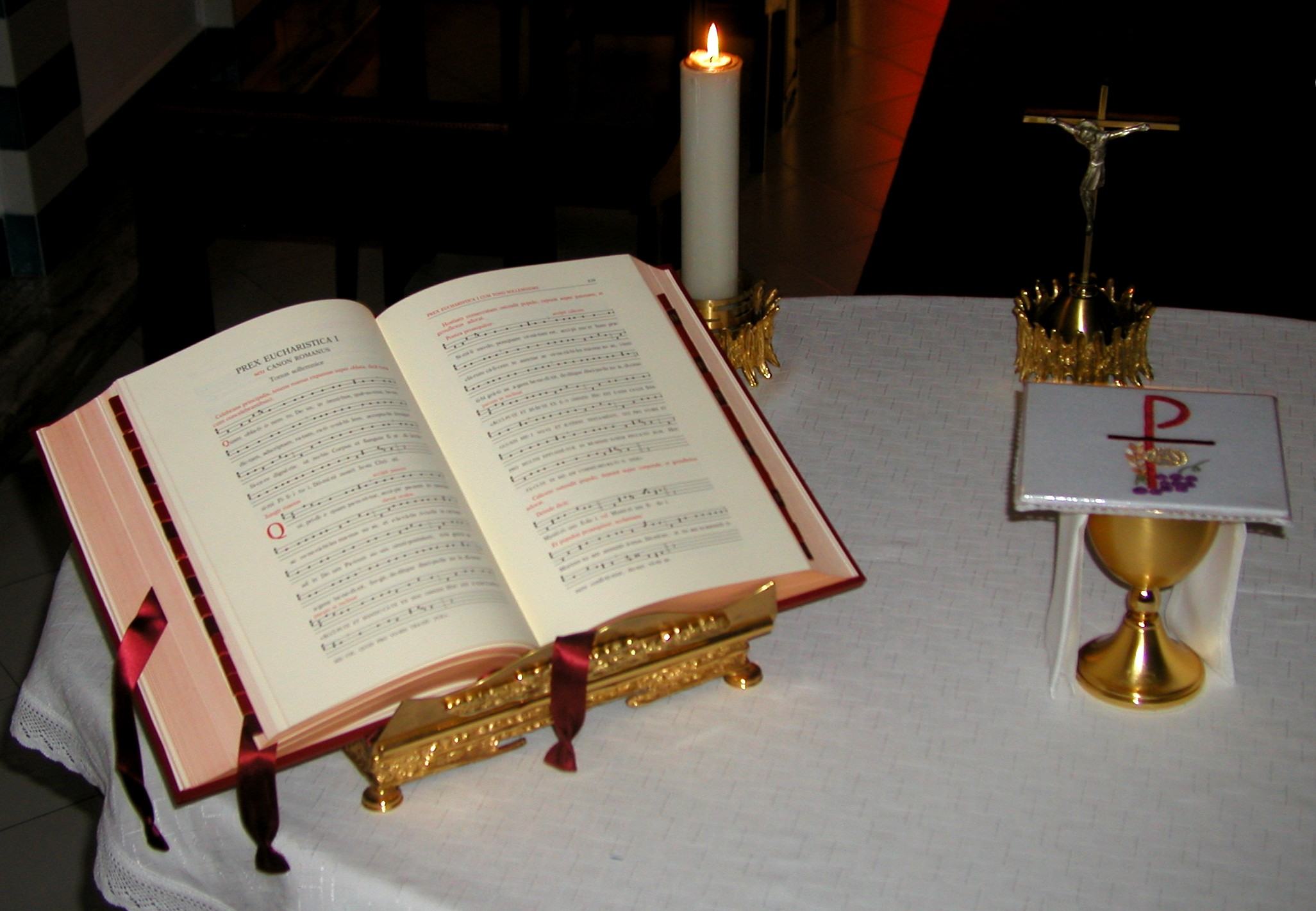 photographie faite par moi Lima 24 septembre 2006 à 14:49 (CEST)